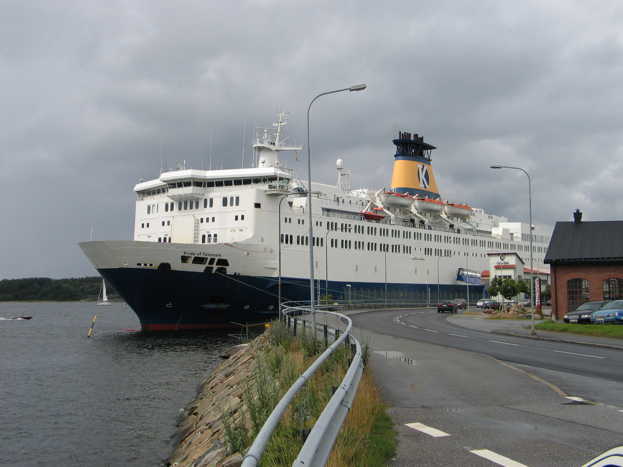 Pride of Telemark in Strömstad